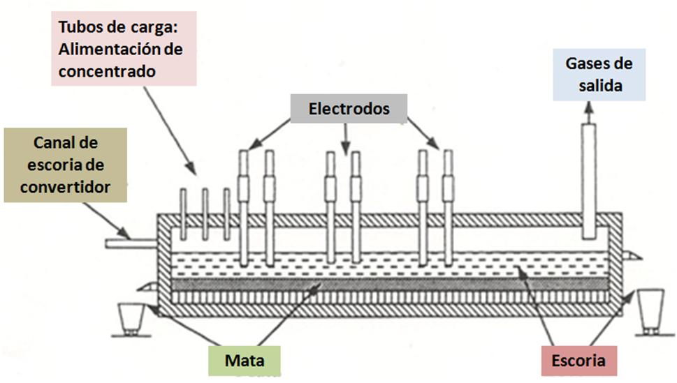 Horno de fusión de arco electrico